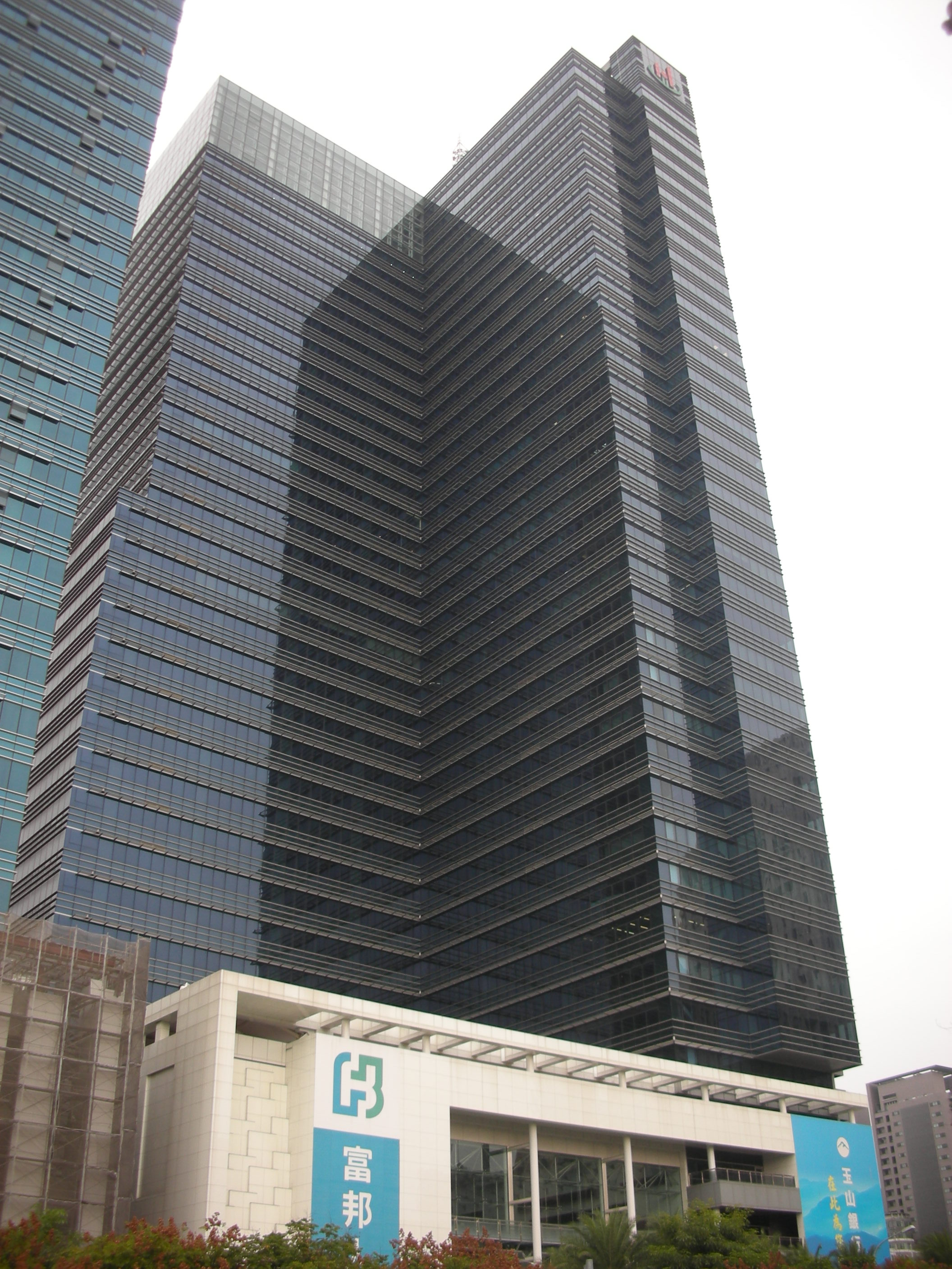 豐邑市政都心廣場，為台灣台中市的一棟摩天大樓，位於市政路。由建築師姚嘉志設計，整體結構呈現L形。